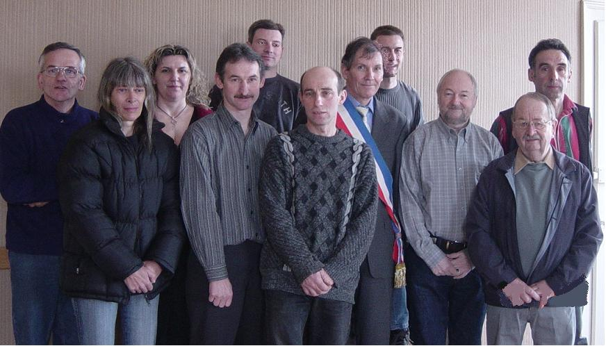 PHOTO DE LA chapelle XIXème de MEURCOURT .VILLAGE DE FRANCE